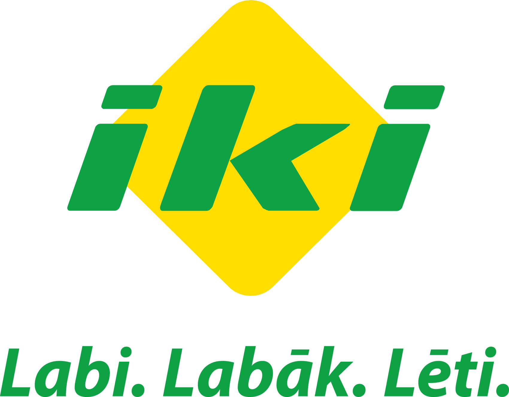 iki Latvijas logo